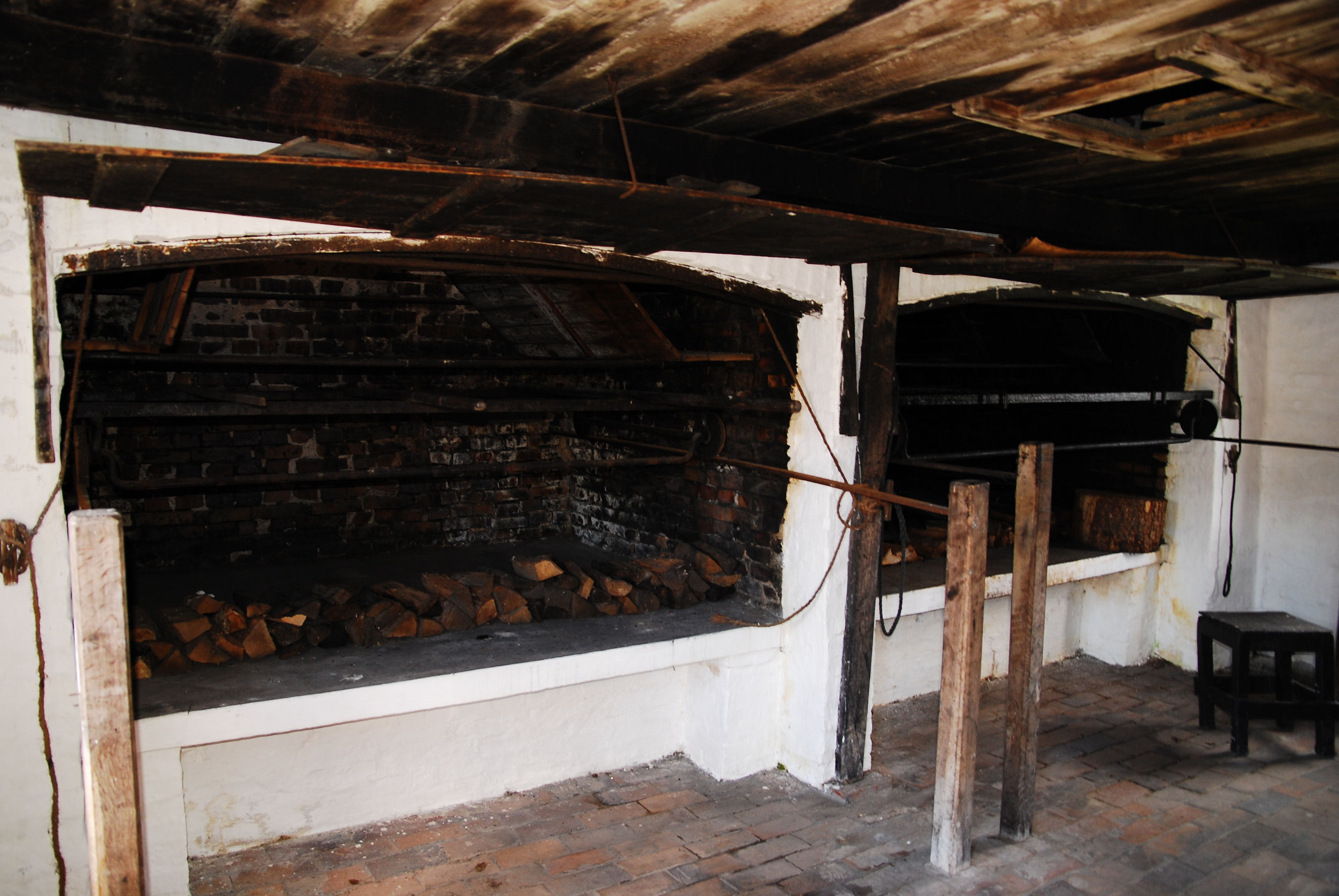 piece wędzarnicze w wędzarni ryb w Hasle na Bornholmie